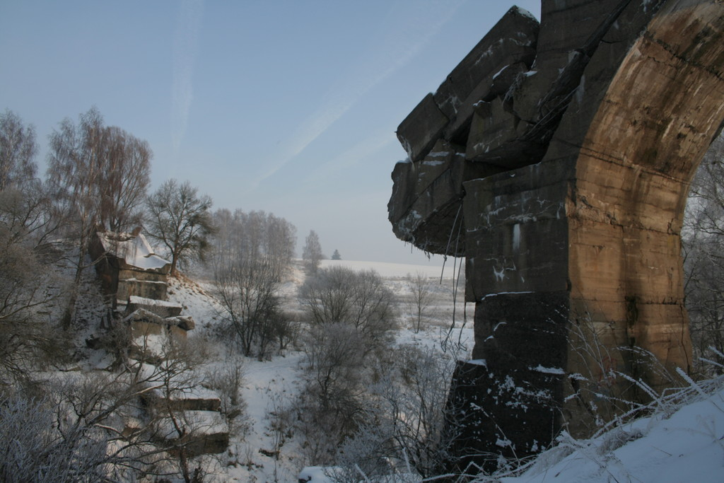 Kruklanki-zwalony most na Sapinie